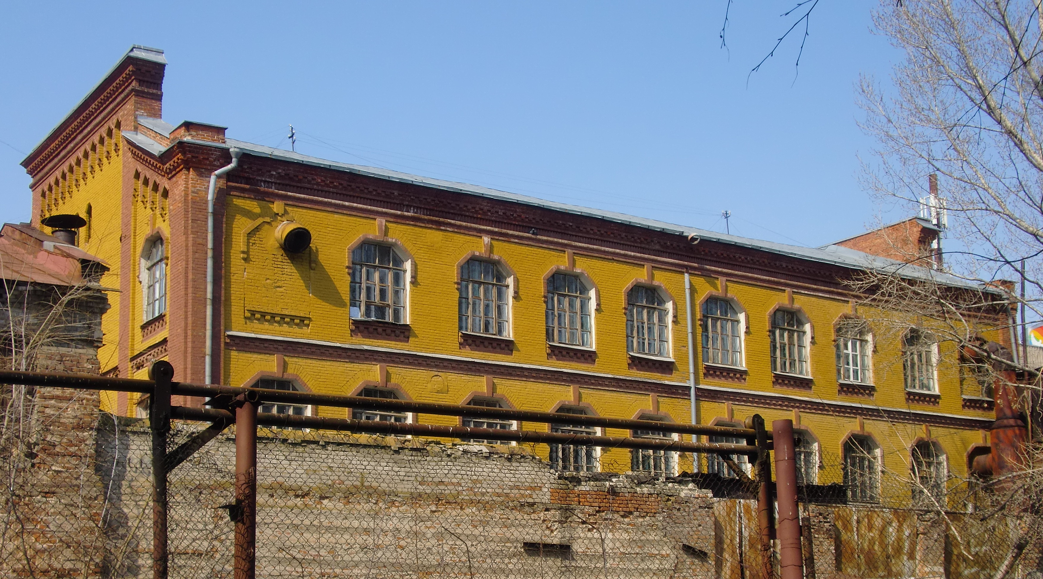 Саратов. Швейная фабрика № 5